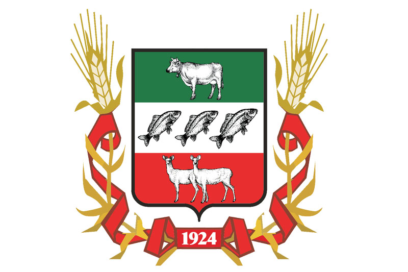 Герб Частоозерского района